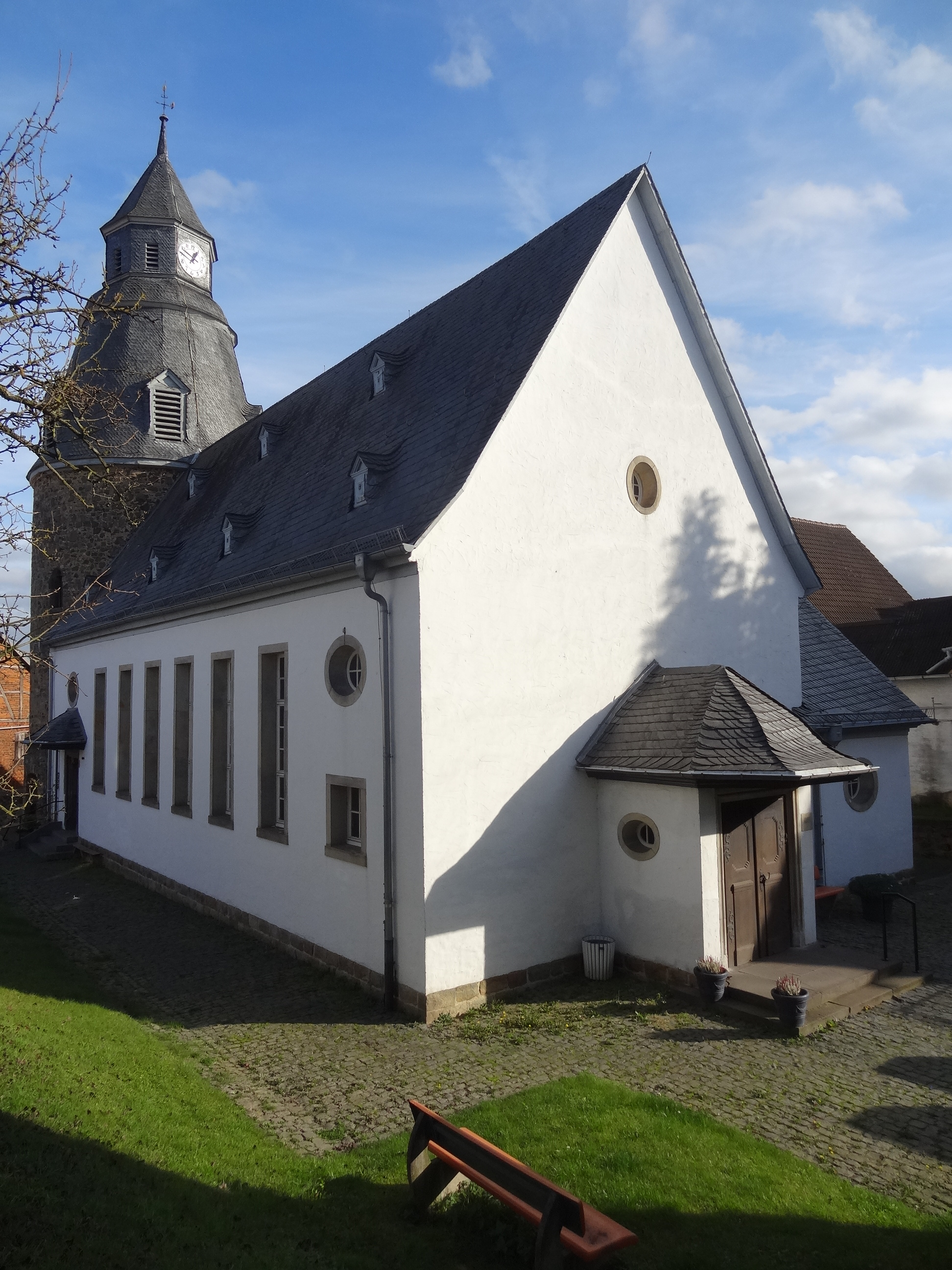 Evangelische Pfarrkirche (Griedel)